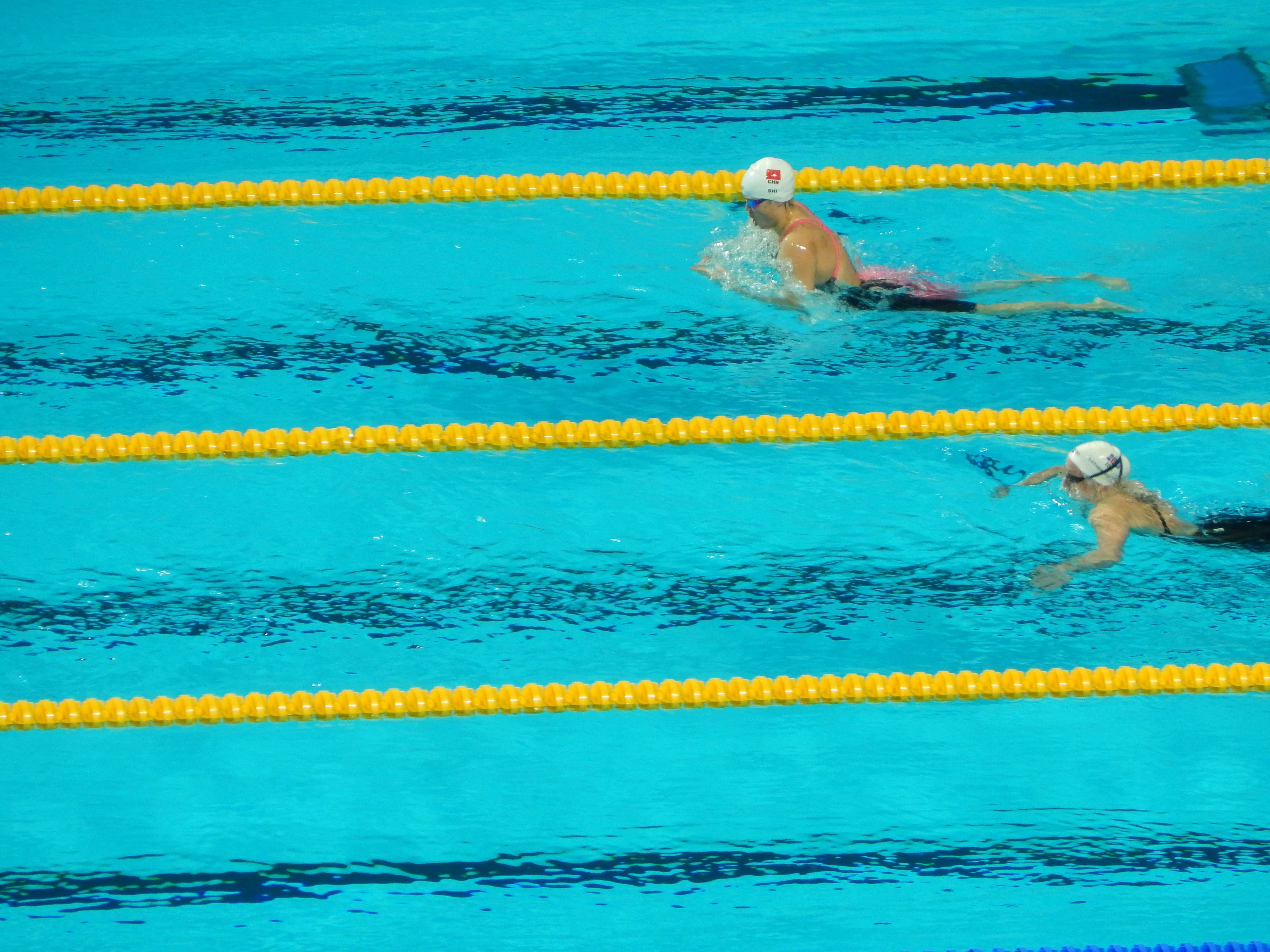 Переплывка в полуфинале 200 метров брассом у женщин в Казани